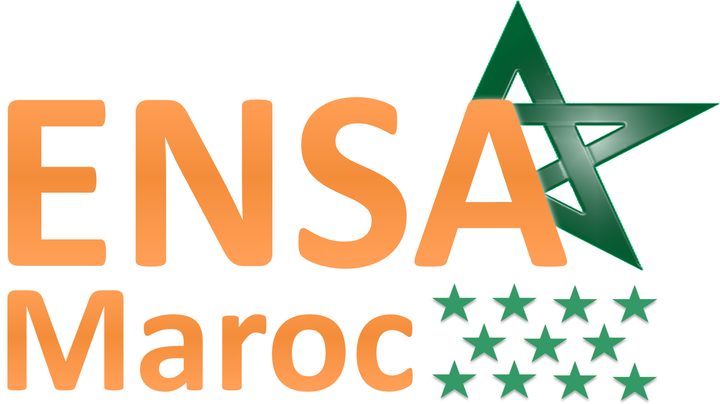 Logo ENSA Maroc